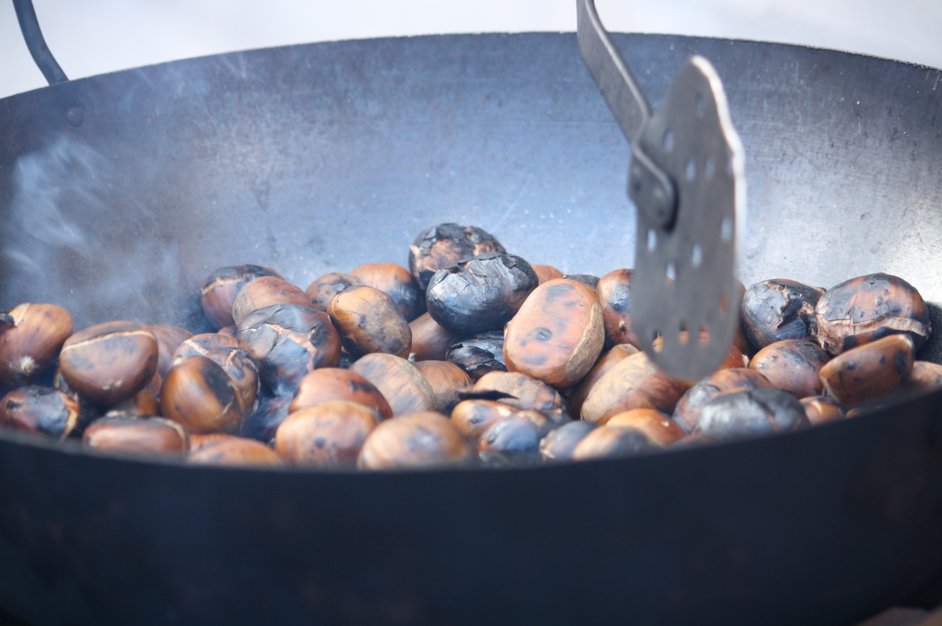 Toma castaña